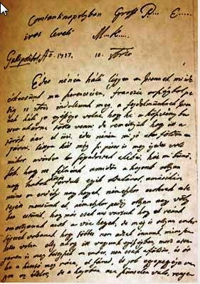 Mikes Kelemen: Törökországi levelek kézirata